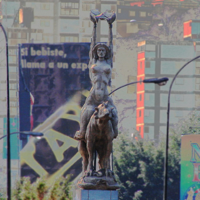 Escultura de María Lionza ubicada en la Autopista Francisco Fajardo en Caracas; la obra original de Alejandro Colina amaneció francturada en junio de 2004. La ruptura se produjo a nivel de la cintura de la heroína, desplomándose toda su parte superior. María Lionza representa el culto aborigen y matriarcal de muchos venezolanos. Si tiene curiosidad en profundizar sobre el tema dejo dos links: .ve/ElizabethPazos/PresentacionElizabethPazo...